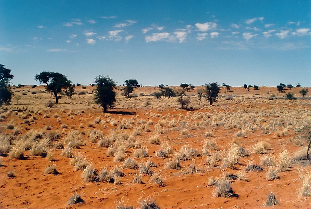 Kalahari in Namibia